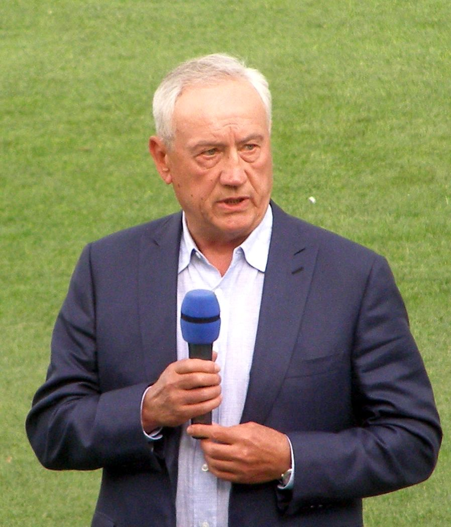 Петро Димінський під час представлення команди "Карпати" (Львів) перед сезоном 2017/18. Зустріч з уболівальниками